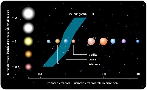 Eguzki Sistemako Gune Bizigarrien (GB) irudia.